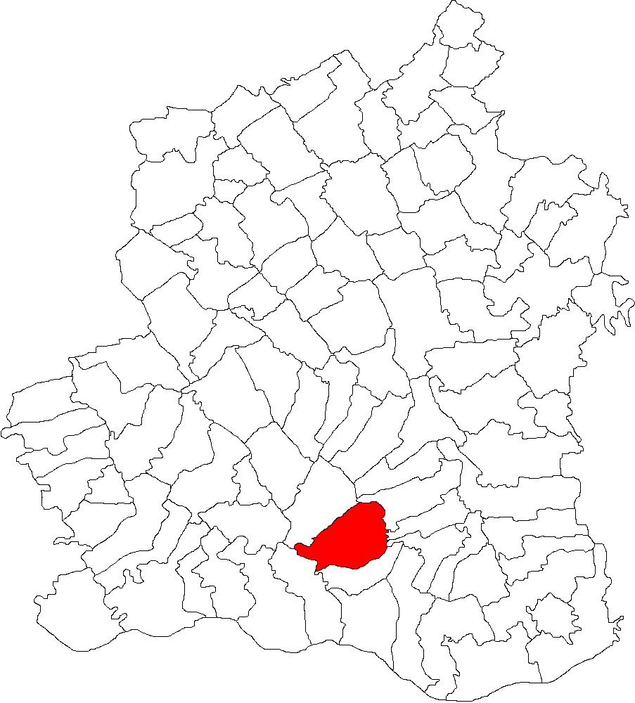 Categorie:Hărţi ale judeţului Teleorman